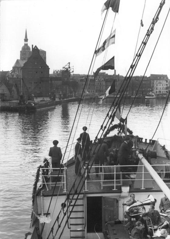 Das erste Hochseeschiff der Deutschen Demokratischen Republik in Dienst gestellt. Am 13. Oktober 1950, dem Tag der Aktivisten, wurde auf der Staatswerft Stralsund das erste Hochseehandelsschiff der Deutschen Demokratischen Republik auf den Namen "Vorwärts" getauft und 1 1/2 Monate vorfristig in Dienst gestellt. An dem feierlichen Taufakt nahmen die Arbeiter und Aktivisten der Staatswerft, der Minister für innerdeutschen Handel, Außenhandel und Materialversorgung, Georg Handke, Staatssekretär Bachem, Vertreter der Sowjetischen Kontrollkommission un der Generalinspekteur der Seepolizei, Verner, teil. UBz: Nach wohlgelungener Tauffahrt kehrt die "Vorwärts" in den Hafen von Stralsund zurück. Illus / Sturm / 14.10.1950 [Herausgabedatum]